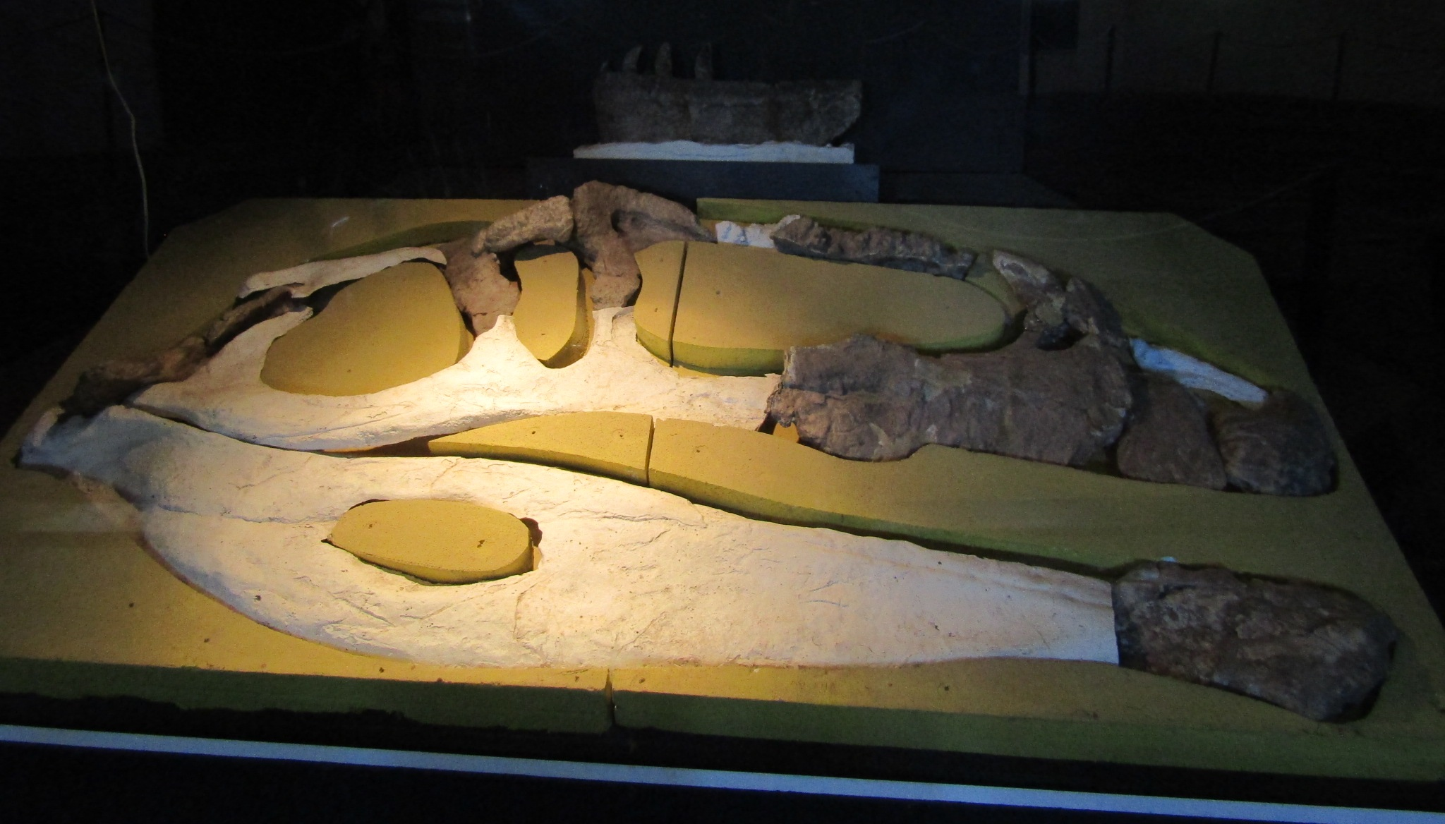 Restos originales del lado derecho del cráneo de Giganotosaurus carolinii en el museo Paleontólogico Ernesto Bachmann (vistos desde otro ángulo).